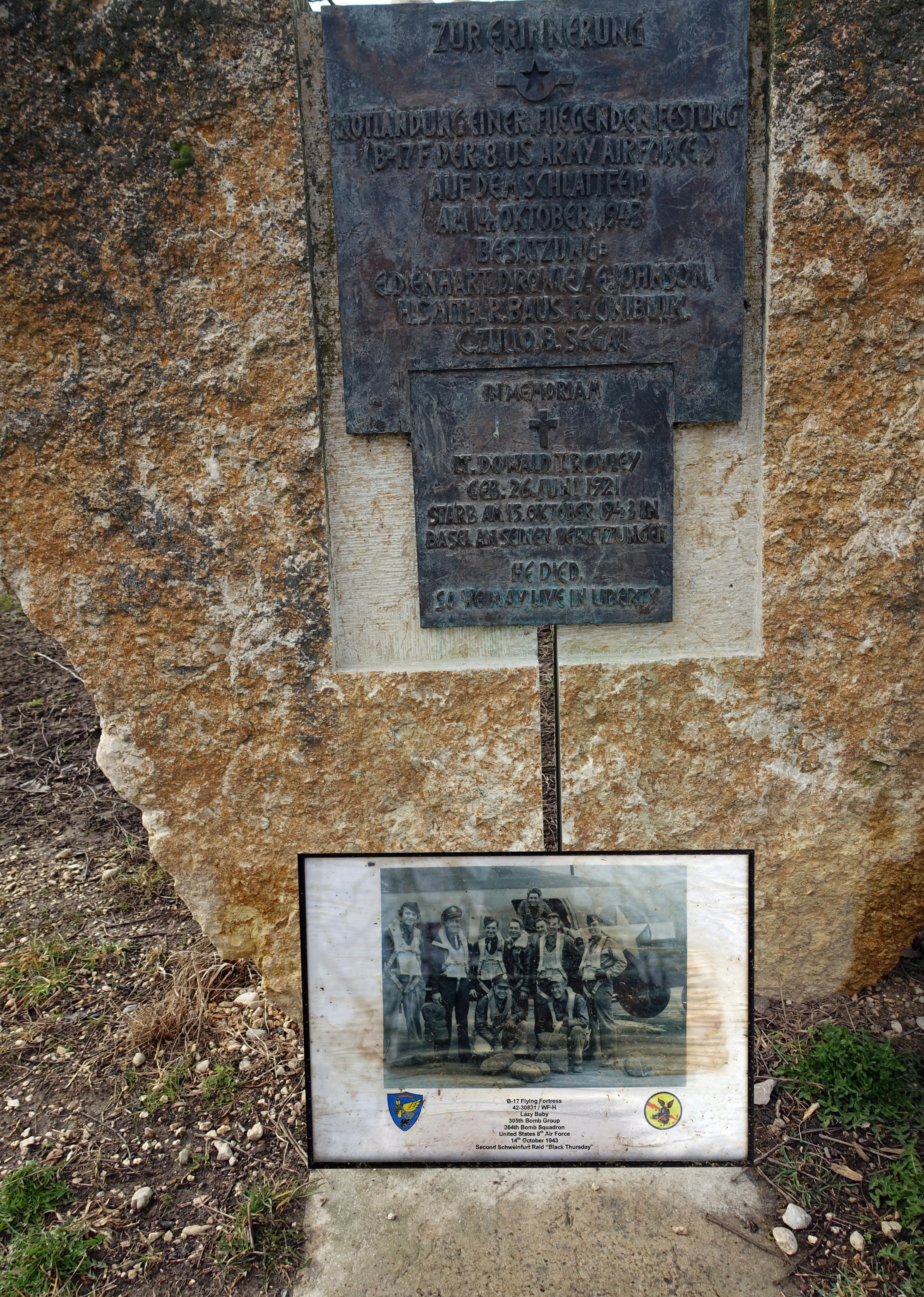 Gedenkstein. Standort: 47°28'43.6"N 7°34'25.5"E, 47.478785, 7.573746 Am 14. Oktober 1943 musste ein US-amerikanischer Bomber des Typs Boeing B-17 in der Nähe Aesch Basel-Land notlanden.